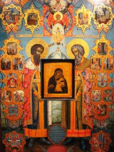 Рама со святыми ярославскими чудотворцами князьями Василием, Константином и 20 клеймами Богородичных явлений и чудес работы Ивана Семенова Смирнова